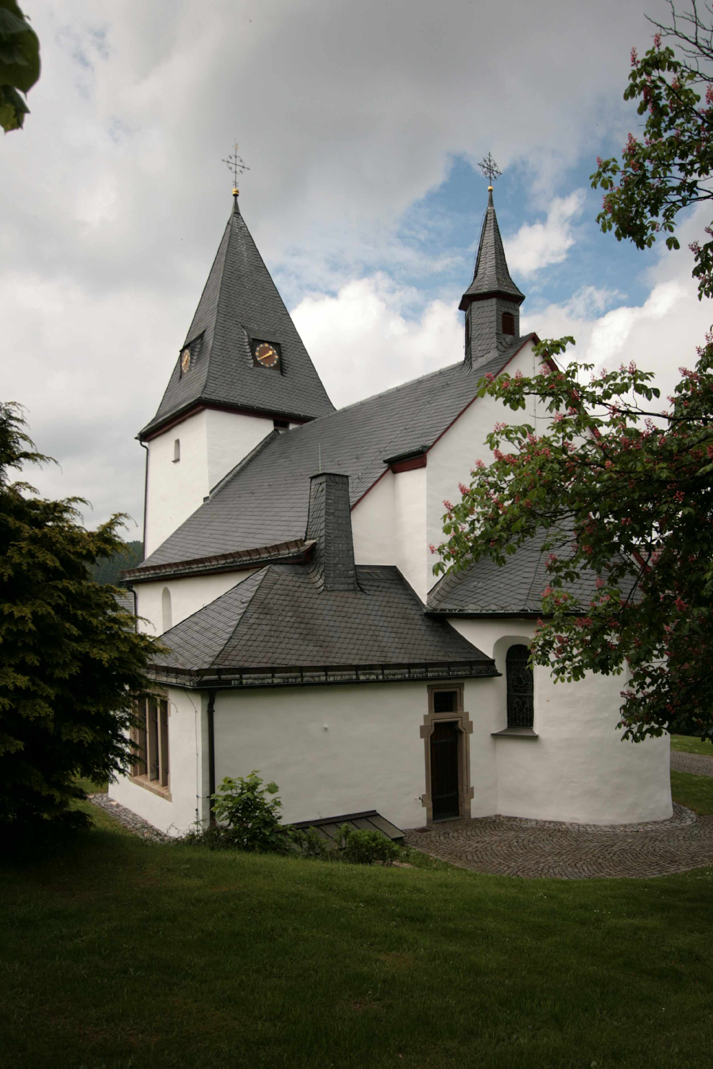 Kirche Schliprüthen, Gemeinde Finnentrop eigenes Foto, Aufnahmedatum 11.07.2008 Wolfgang Poguntke --Wolfgang Poguntke (talk) 16:24, 11 July 2008 (UTC)